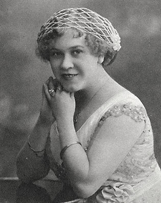 Svea Textorius (1877-1926)